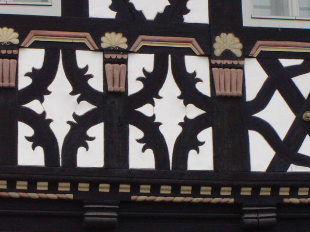 gaschwungene Fachwerkelemente Suhl-Heinrichs